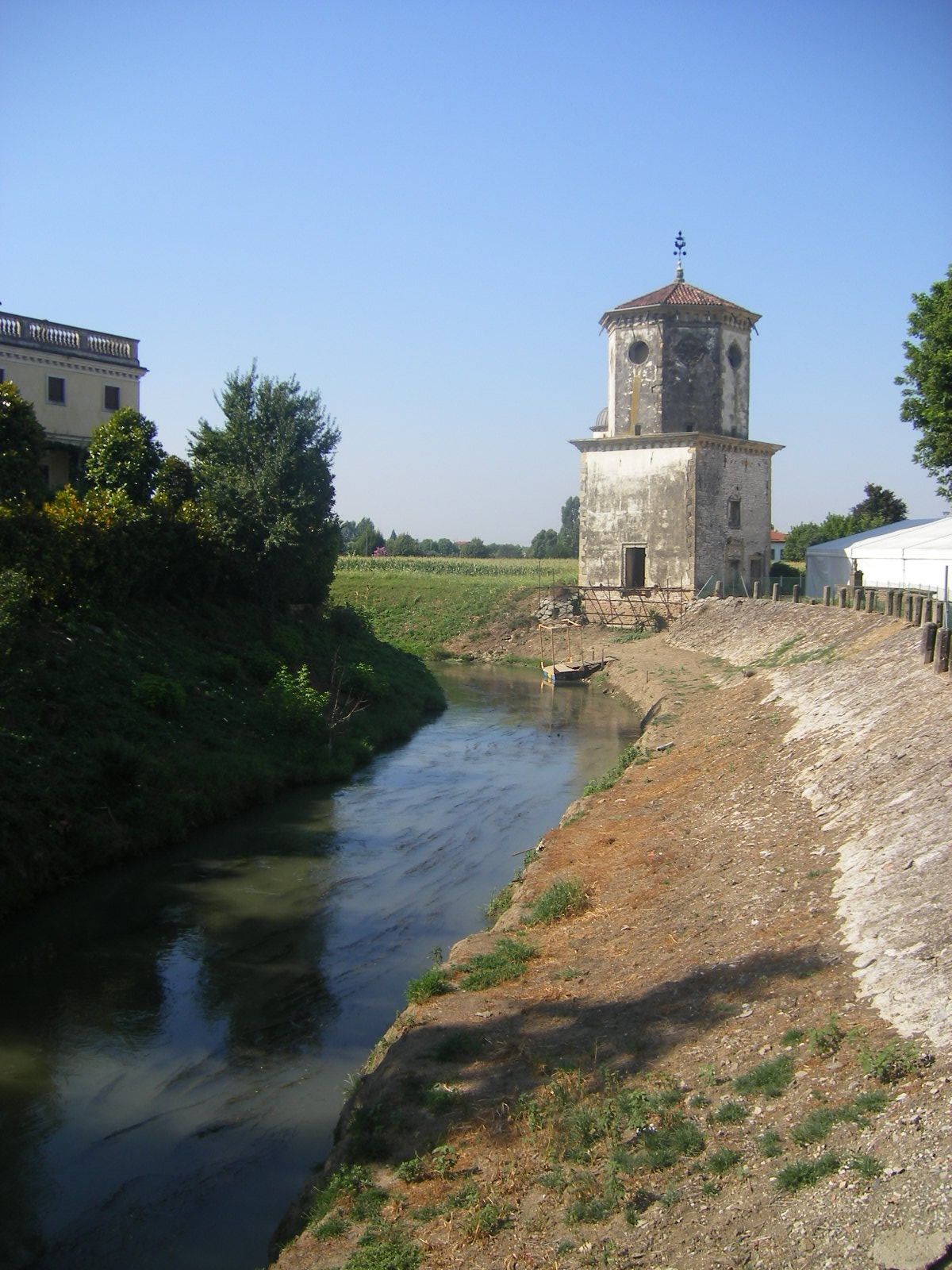 Albettone